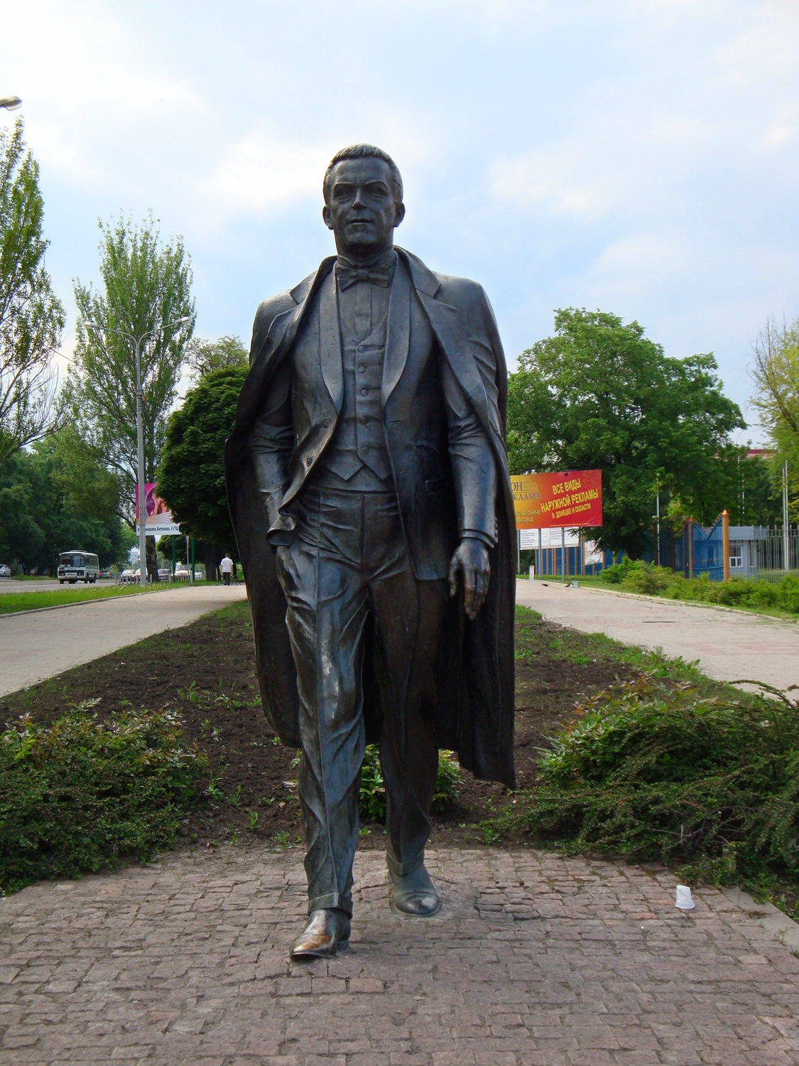 Пам'ятник Кобзону И. Д.-співаку народному артисту СРСР, Донецьк, вул. Челюскінців 189, біля палацу молоді «Юність»